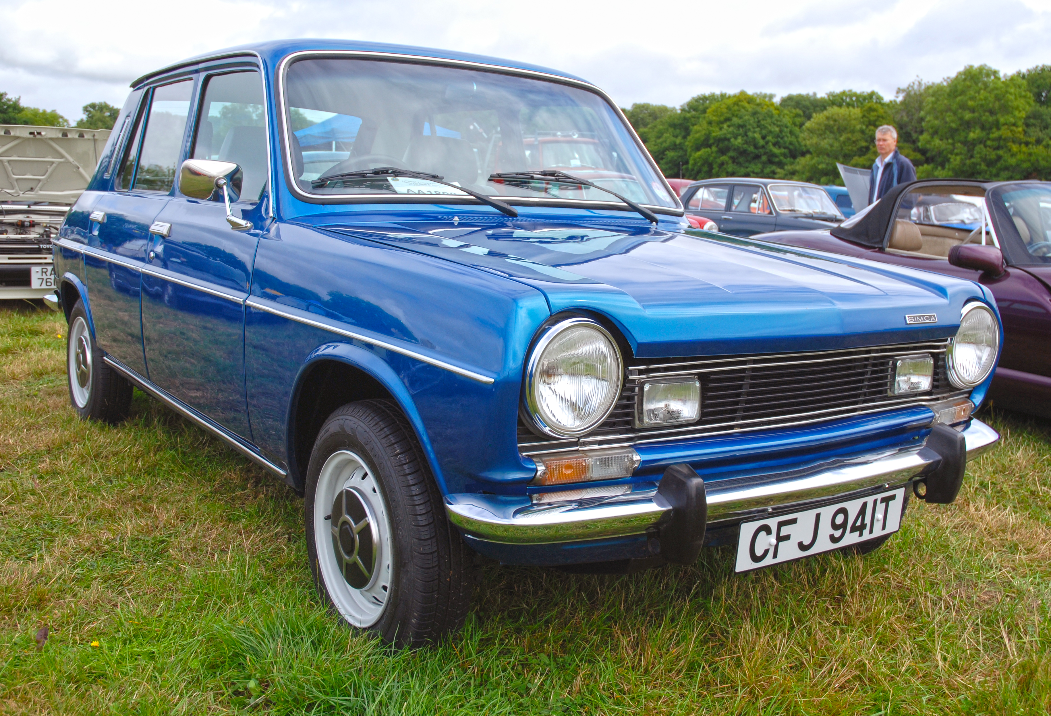 Aug 2012